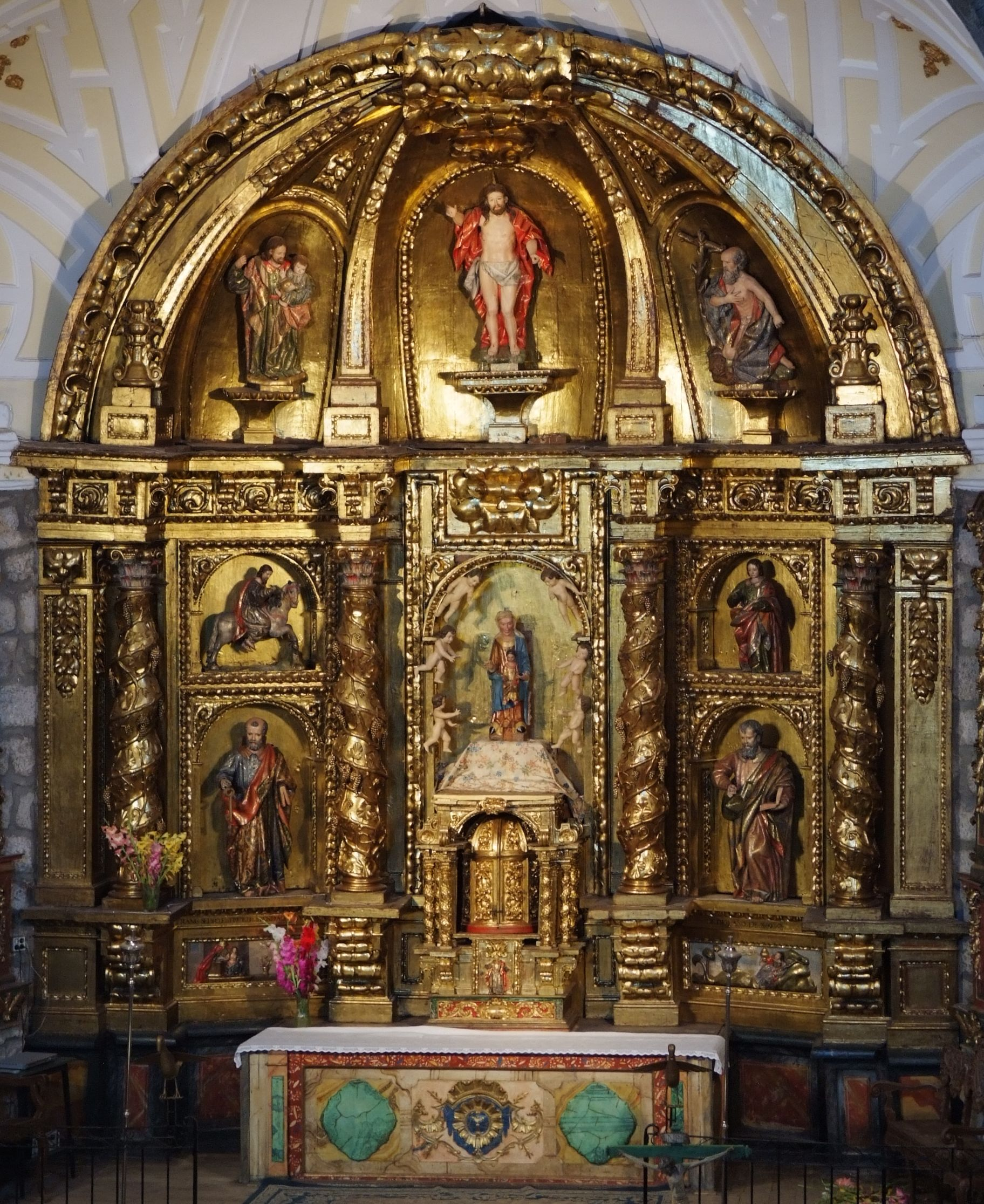 Retablo mayor de la iglesia parroquial de Nuestra Señora de la Asunción en Villafranca de la Sierra (Ávila; España), restaurado en el año 2009